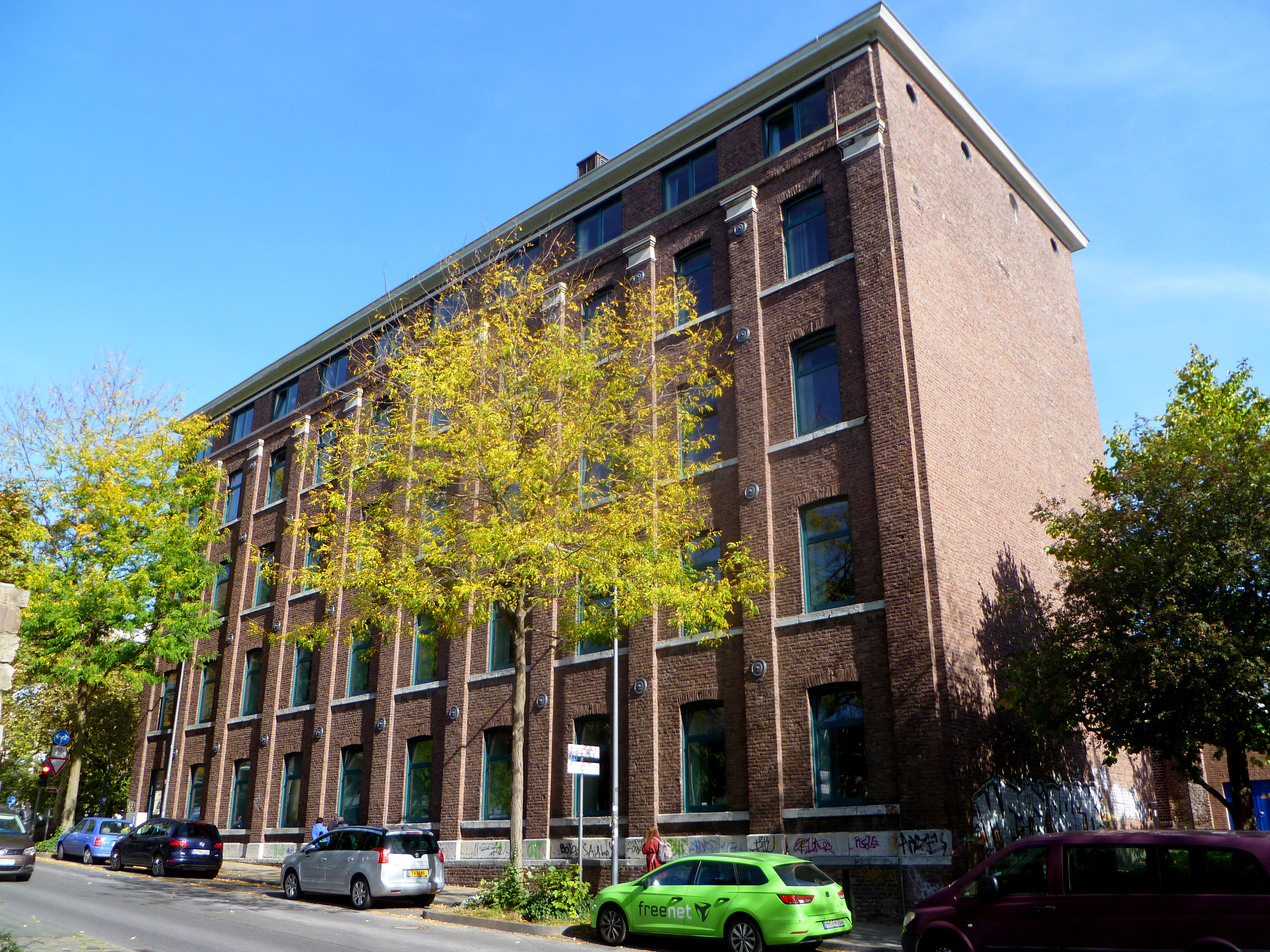 Produktionsgebäude der ehem. Tuchfabrik Marx & Auerbach in Aachen, Templergraben/Eilfschornsteinstraße, Baudenkmal